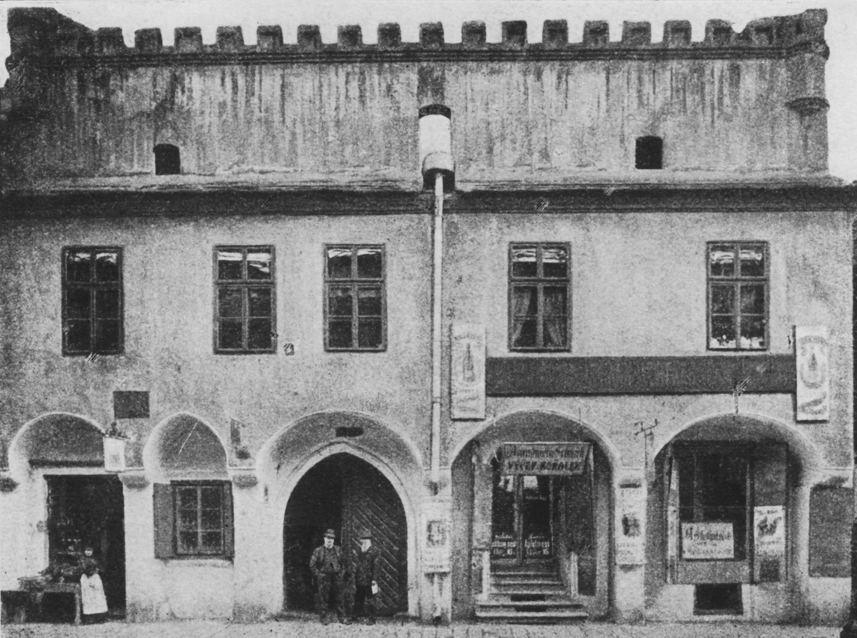 Album starých Budějovic. Žižkův dům, dnes nazývaný Wortnerův dům v ulici U Černé věže. (orig. text: Tak zvaný „Žižkův“ dům ve Sternekově ul. (před úpravou v roce 1911) s atikou charakteristickou pro jihočeskou renaissanci)